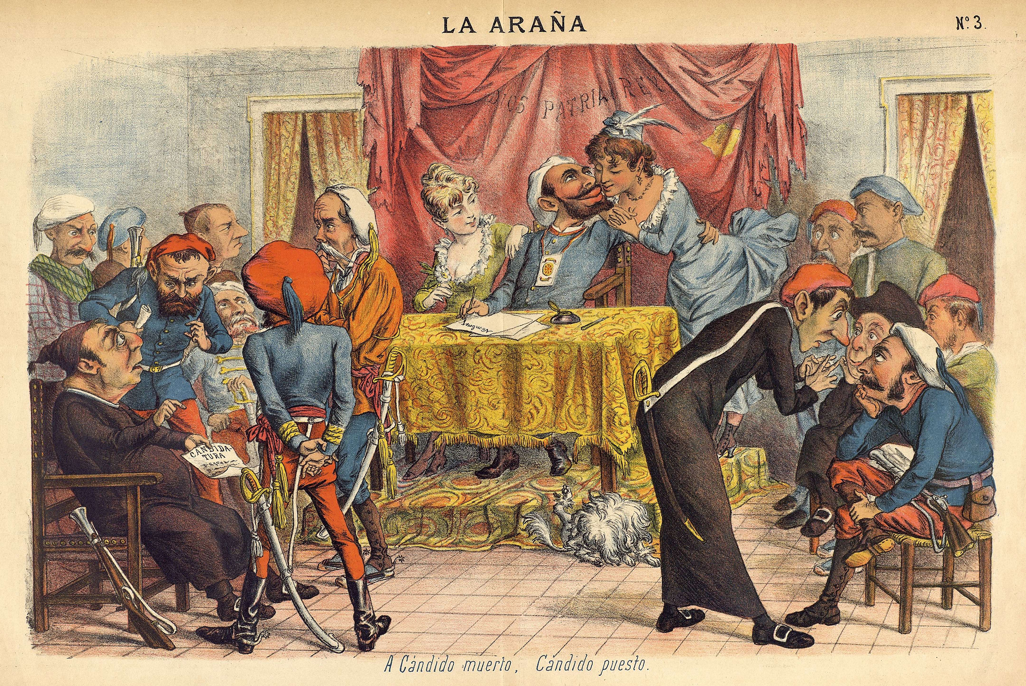 A Cándido muerto, Cándido puesto, caricatura publicada en la revista satírica La Araña.